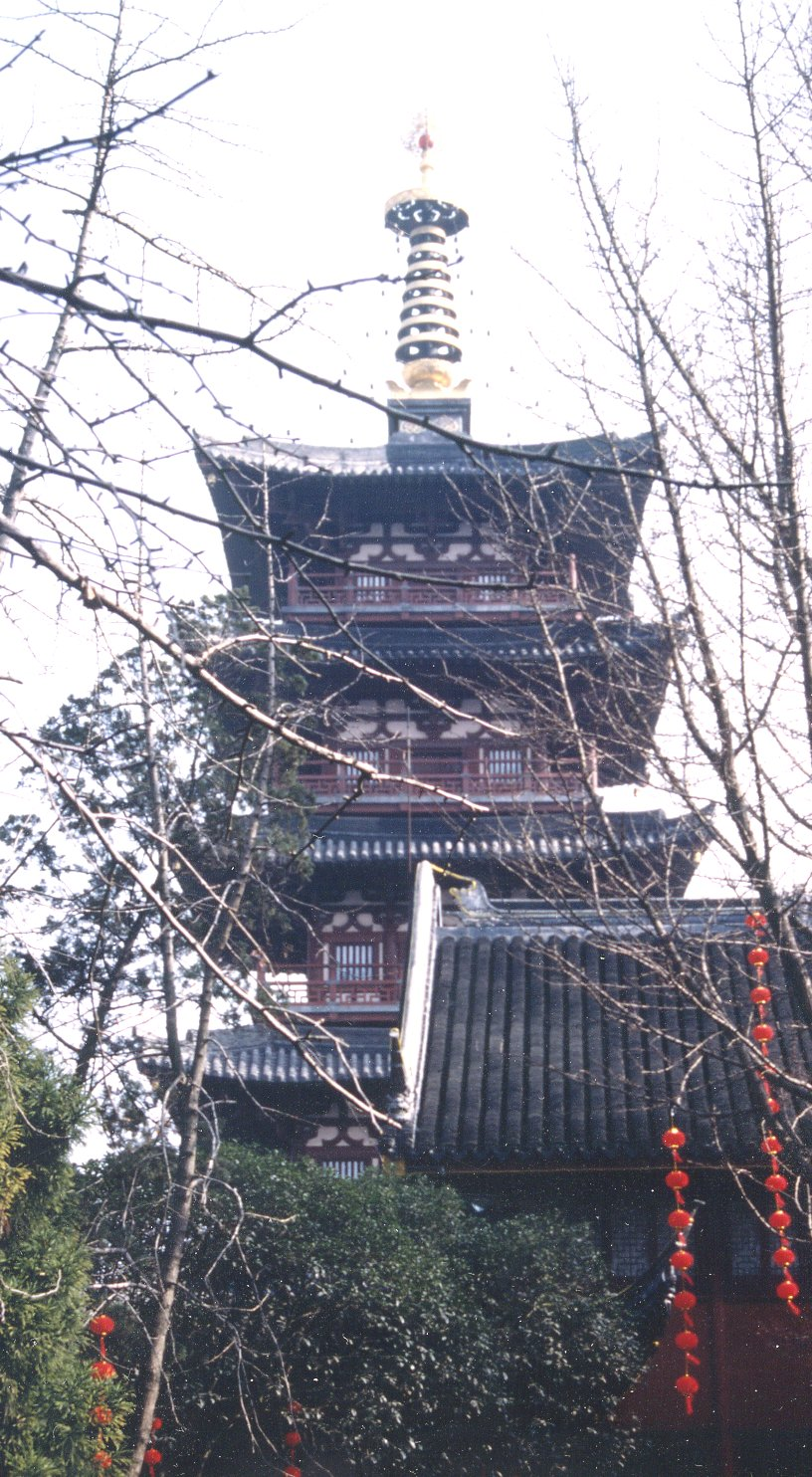 寒山寺普明宝塔